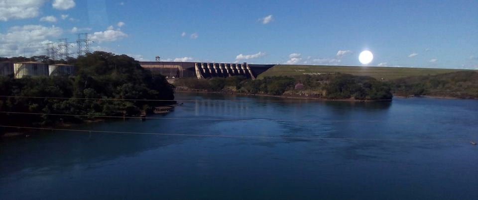 Rio Grande, no município de Fronteira (MG), com a Usina Hidrelétrica de Marimbondo ao fundo.